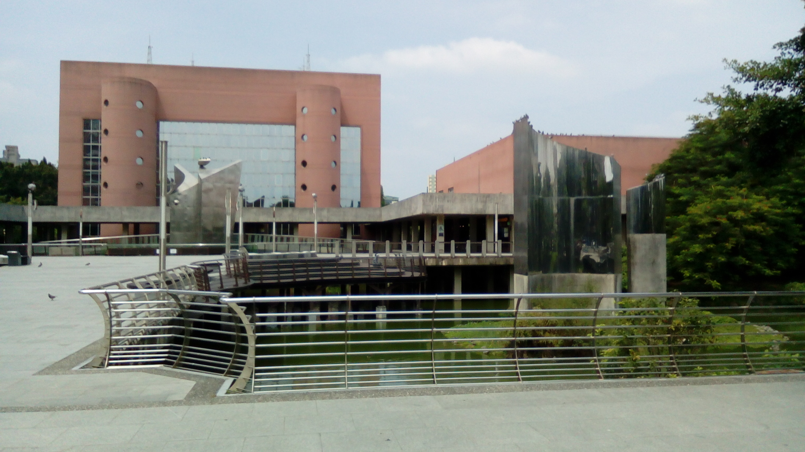 位於中華東路旁 巴克禮紀念公園對面